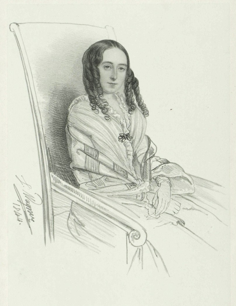 Helene Prinzessin Mestschersky